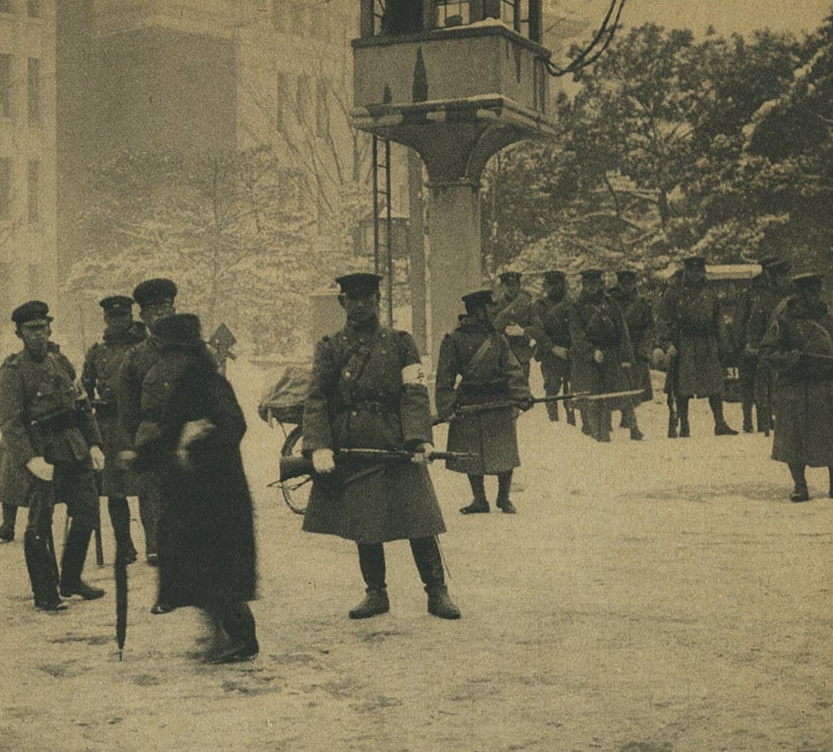 Militari ribelli durante la sollevazione del 26 febbraio 1936 a Tokyo